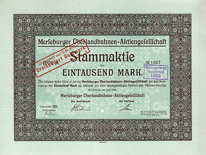 Aktie über 1000 Mark der Merseburger Überlandbahnen AG vom Juni 1919